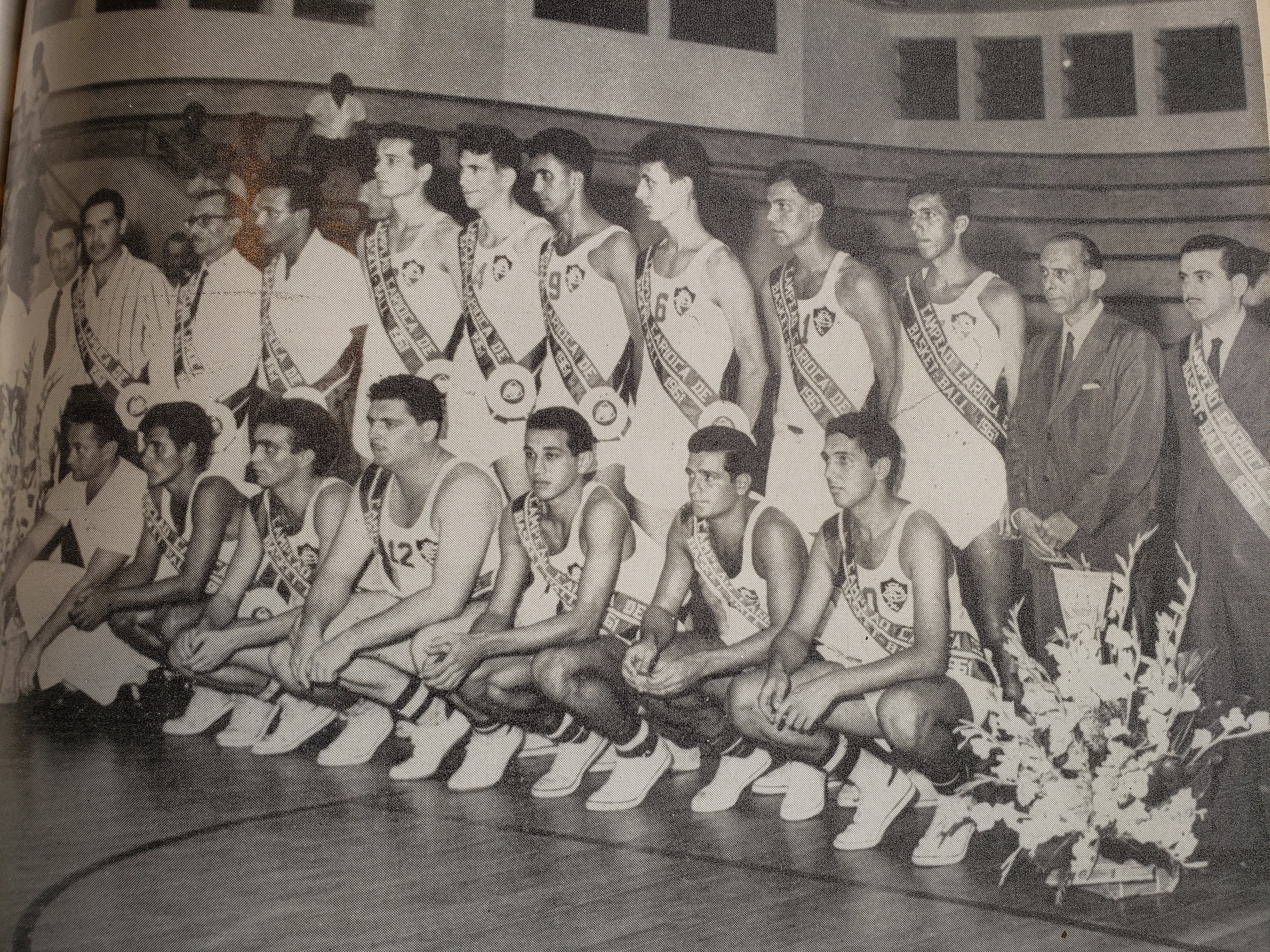 Fluminense campeão carioca de basquete de 1961 retratado na Revista do Fluminense.